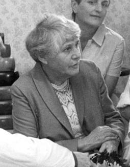 Cottbus, Prof. Ingeborg Rapoport ADN-ZB/Weisflog/ 30. 10. 85 / Cottbus: Vertreter des Komitees "Ärzte der DDR zur Verhütung eines Nuklearkrieges" besuchten das Bezirkskrankenhaus Cottbus. Sie führten Gespräche in verschiedenen Bereichen des Hauses - Prof. Dr. Ingeborg Rapoport diskutierte z.B. mit Schwestern des Kinderklinik. Anschließend fand ein Friedensmeeting im Krankenhaus statt. Abgebildete Personen: Rapoport, Ingeborg Prof. Dr.: Kinderärztin, Charité Berlin, DDR (GND 120997363)